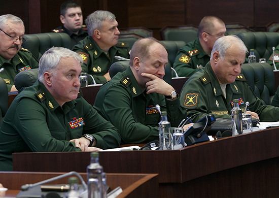 Совещании министра обороны РФ С. Шойгу с руководящим составом МО РФ в Национальном центре управления обороной РФ.